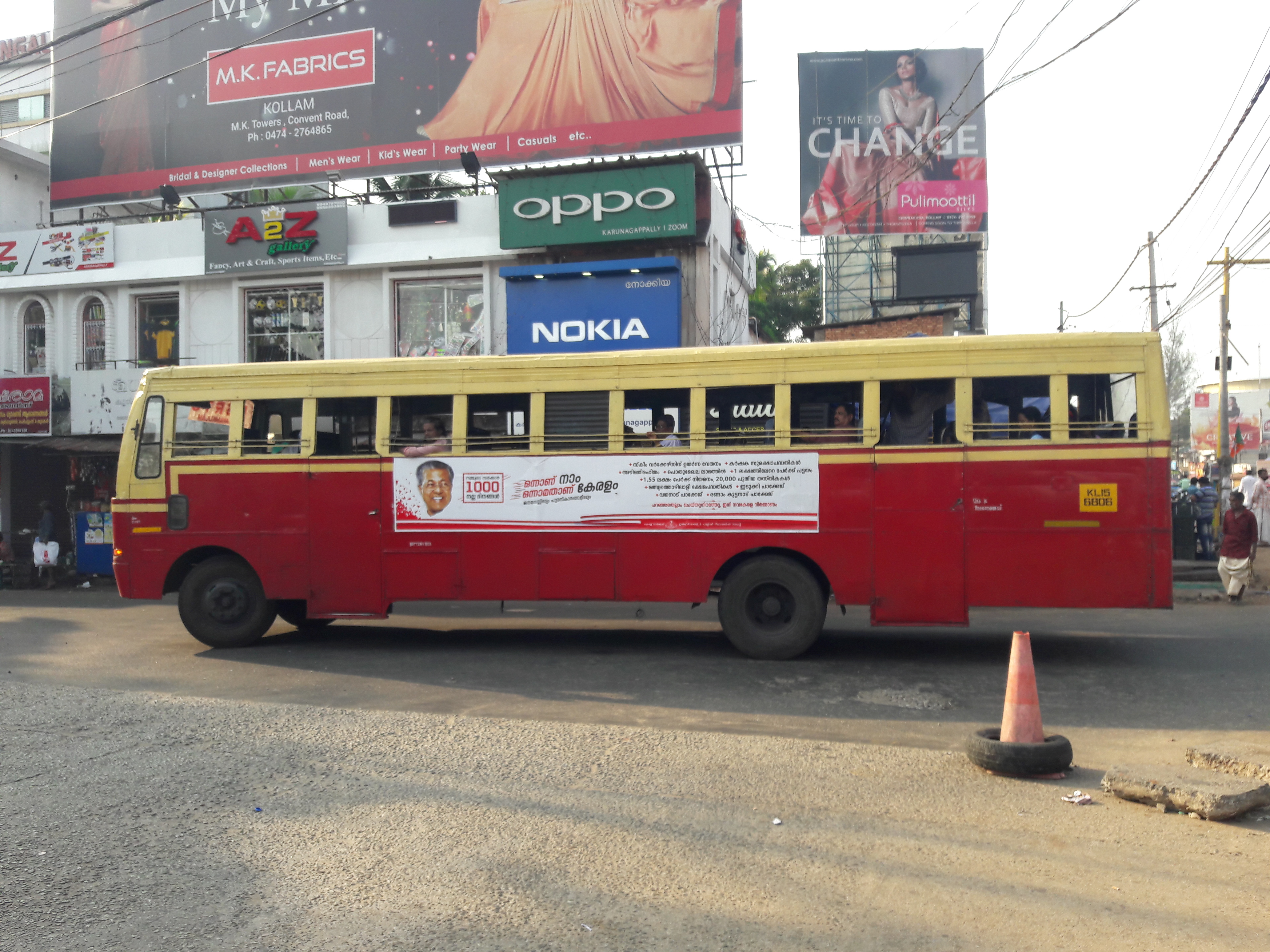 കേരള സ്റ്റേറ്റ് റോഡ് ട്രാൻസ്പോർട്ട് കോർപ്പറേഷൻ